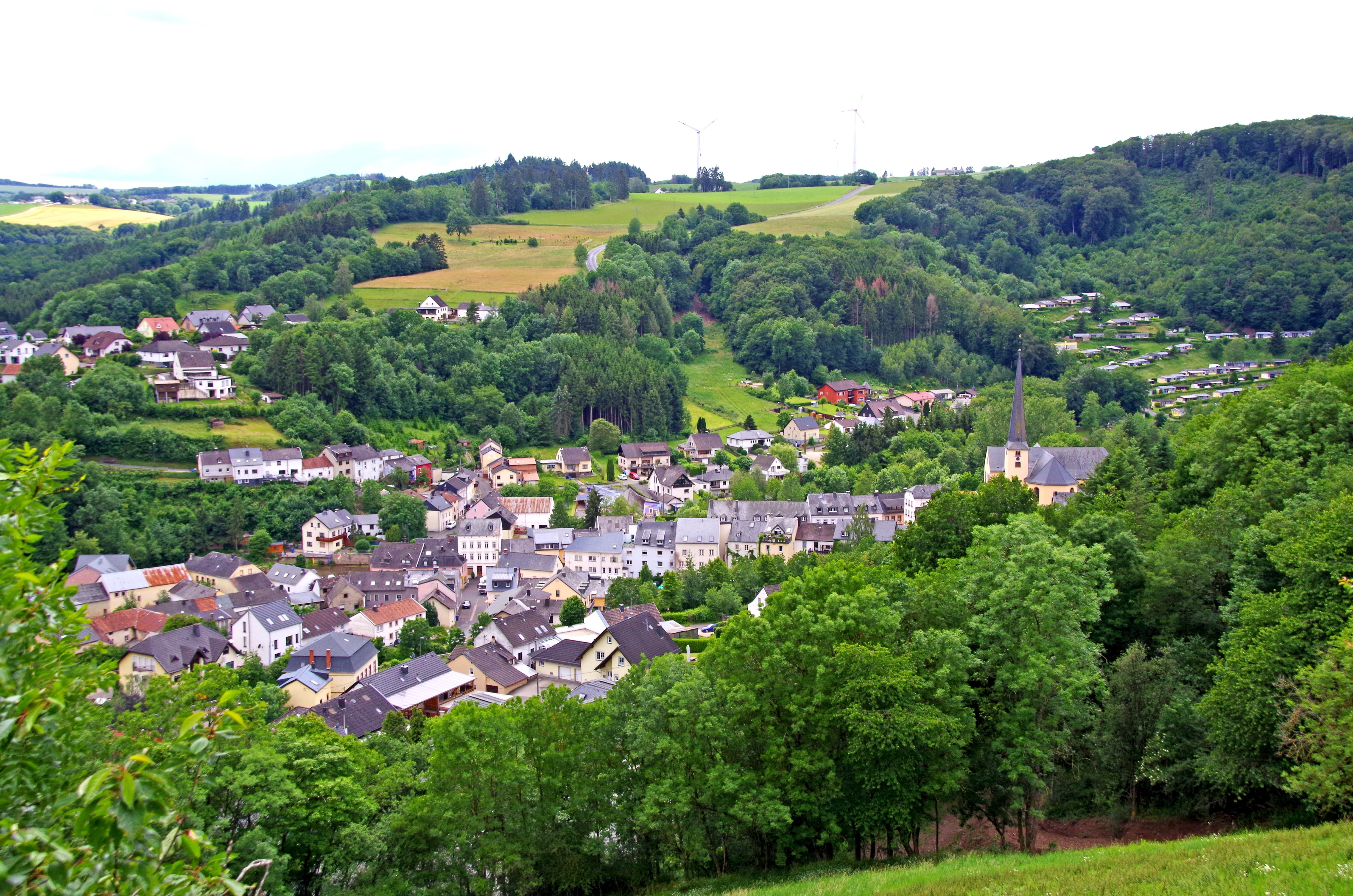 Waxweiler